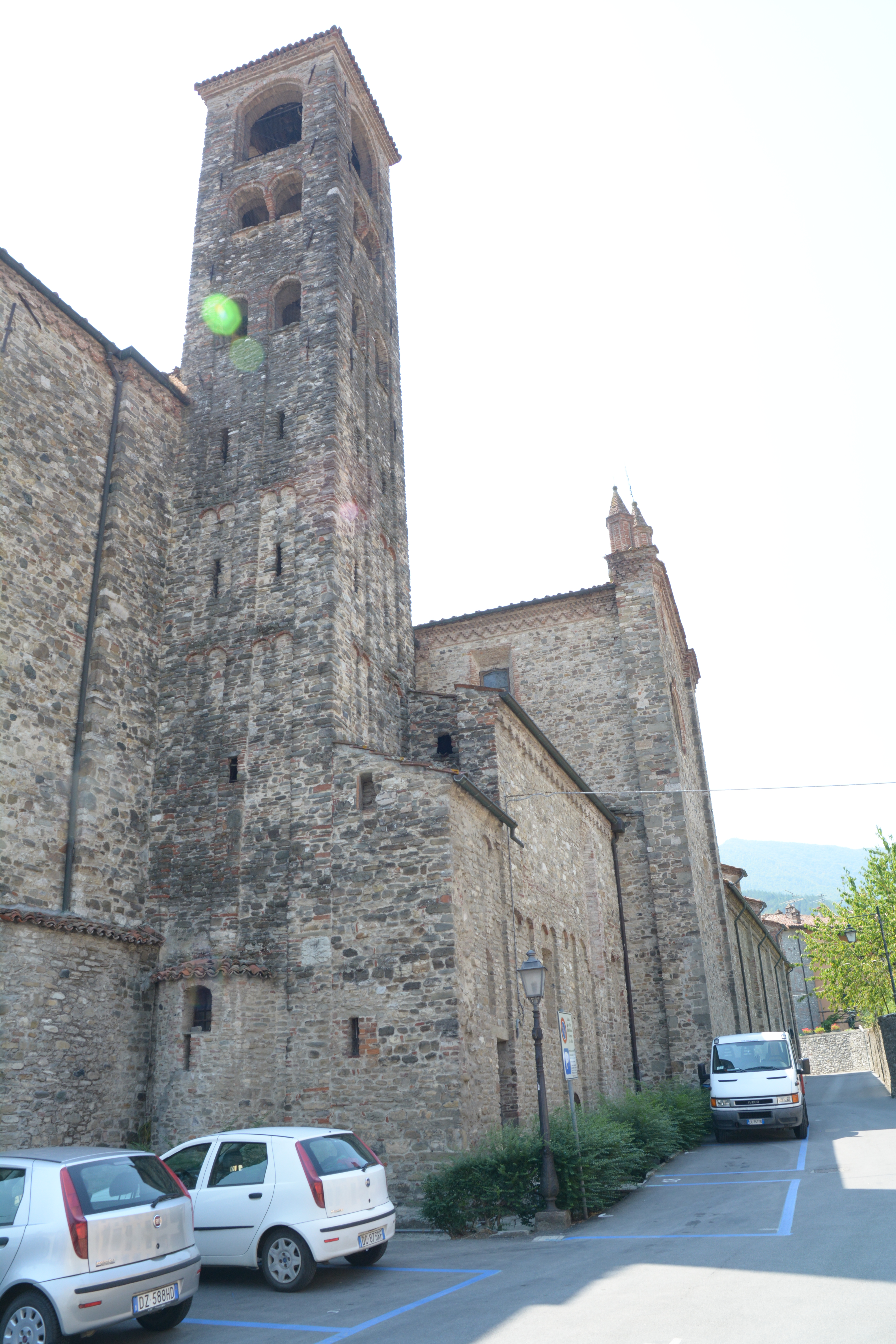 Monastero di San Colombano